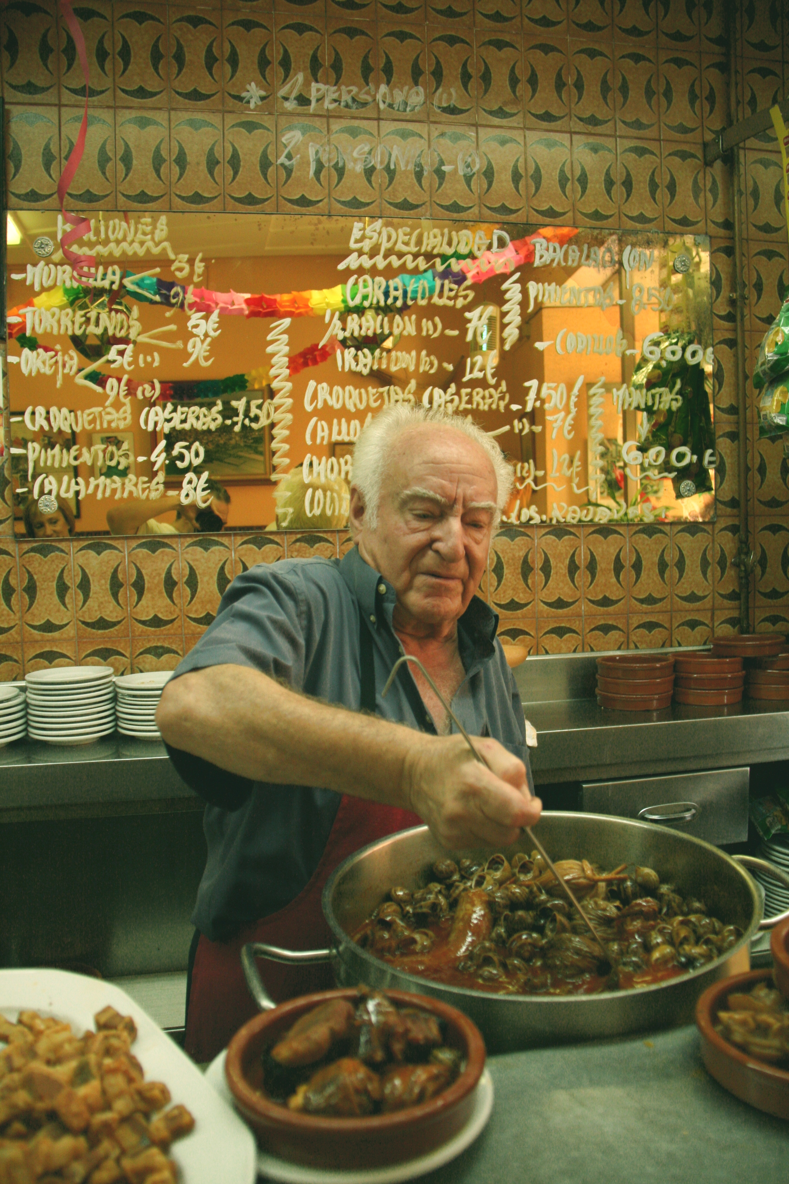 Pote de "caracoles a la madrileña" (Bar "Los caracoles" en Cascorro), Madrid - Dueño Amadeo (en la foto)